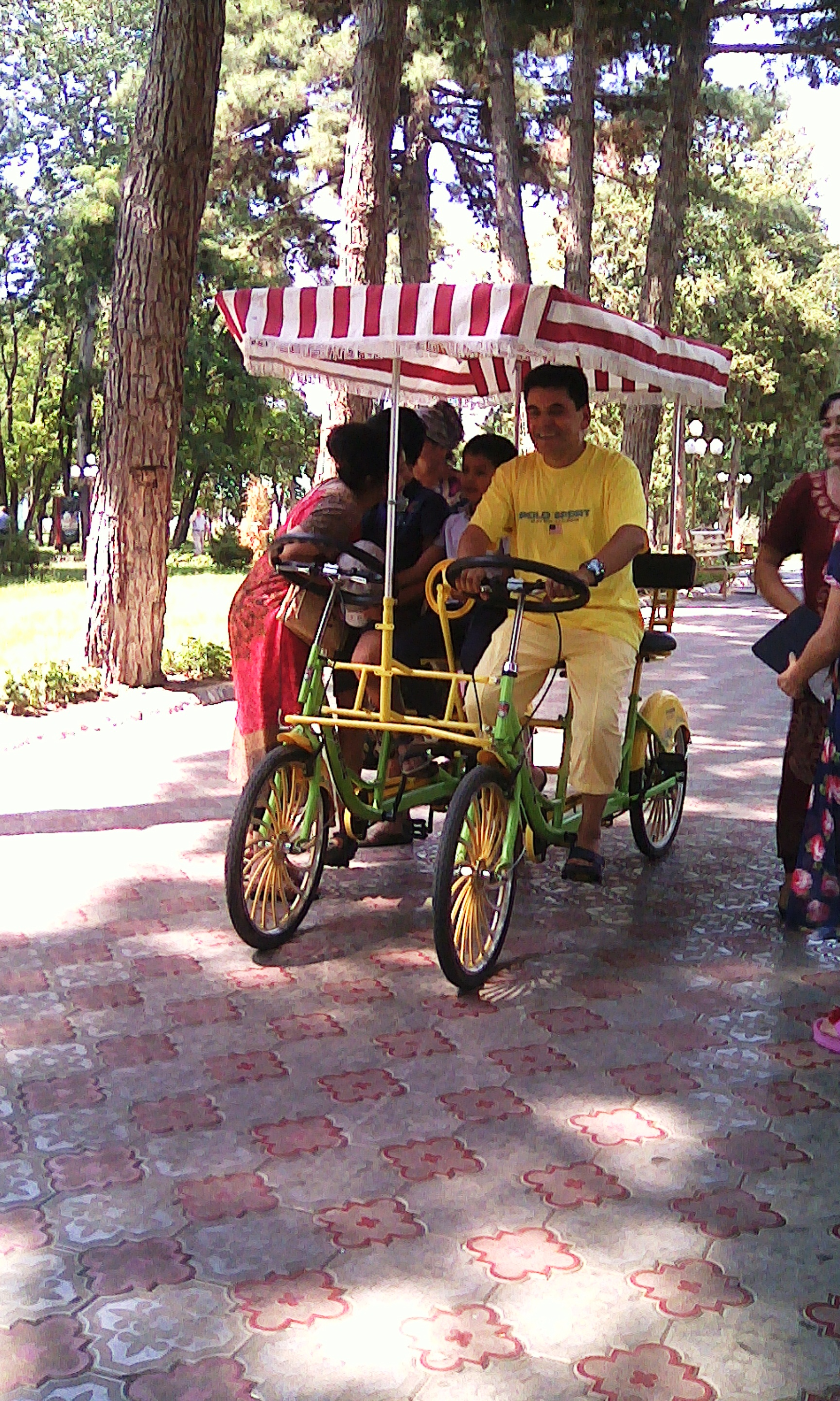 Тоҷикӣ: Гулгаштҳои шаҳри Гулистон